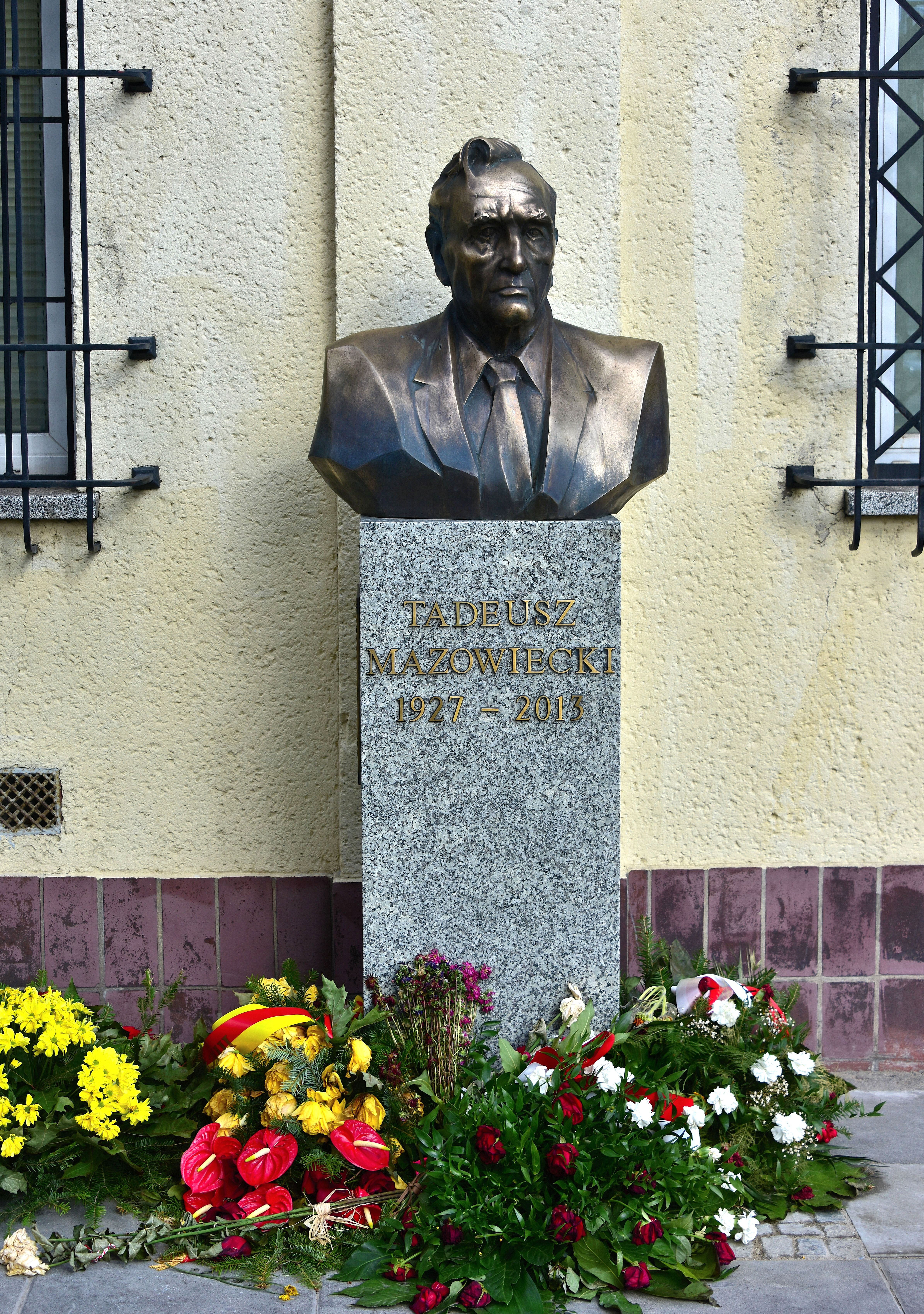 Popiersie Tadeusz Mazowieckiego w Warszawie